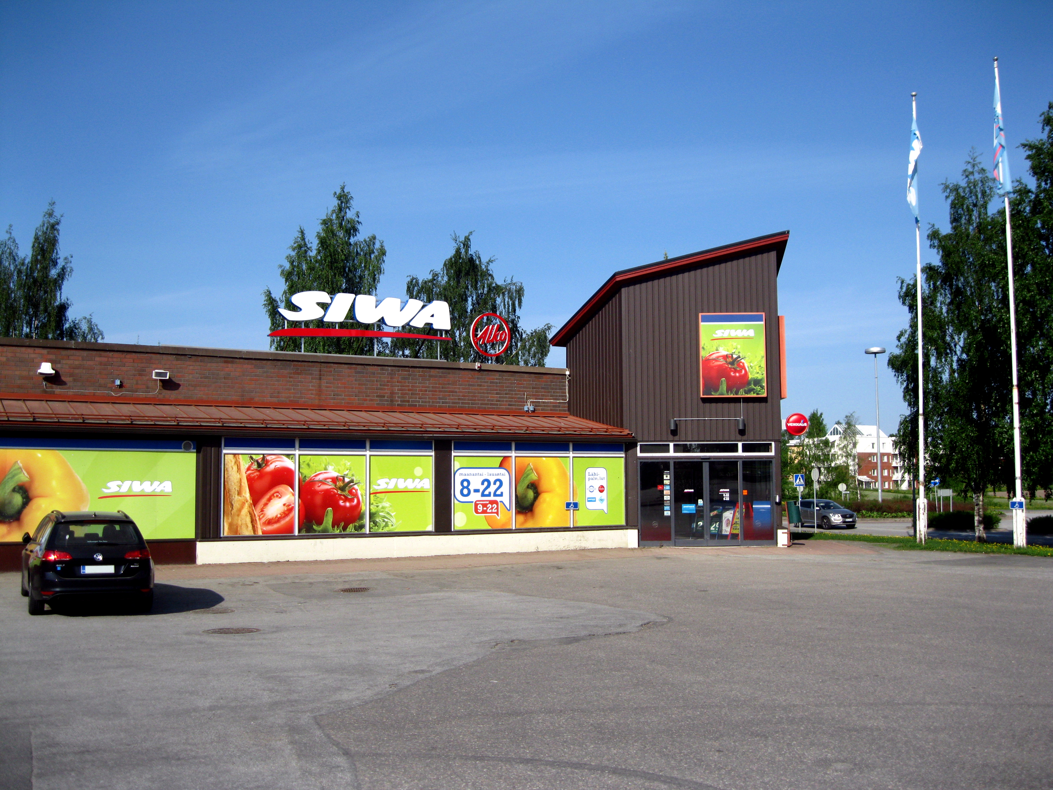 Lappajärven Siwa ja Alko, toukokuussa 2016. Siwa toimi rakennuksessa toukokuusta 2007 elokuuhun 2016.